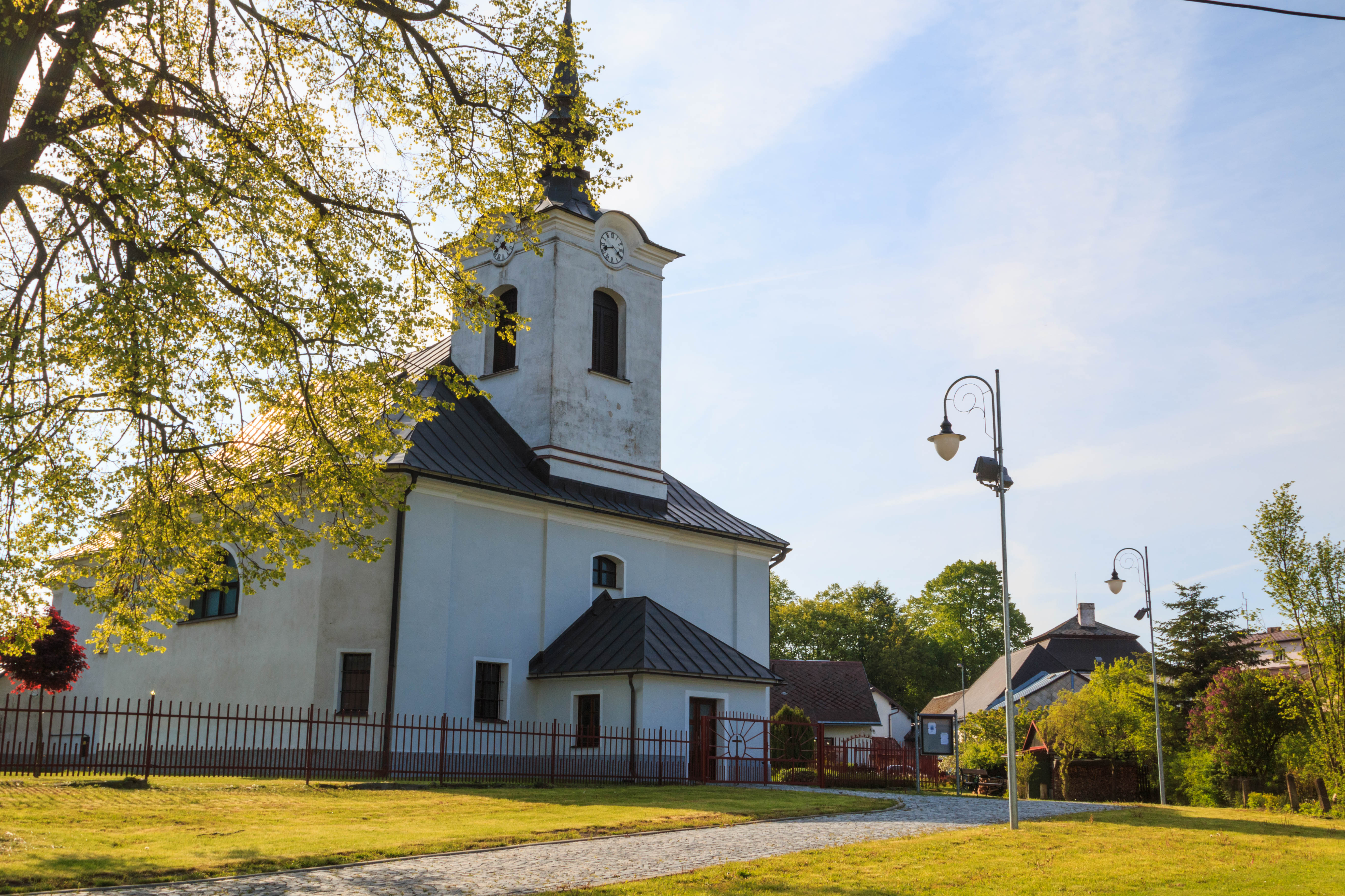 Vojnův Městec kostel svatého Ondřeje